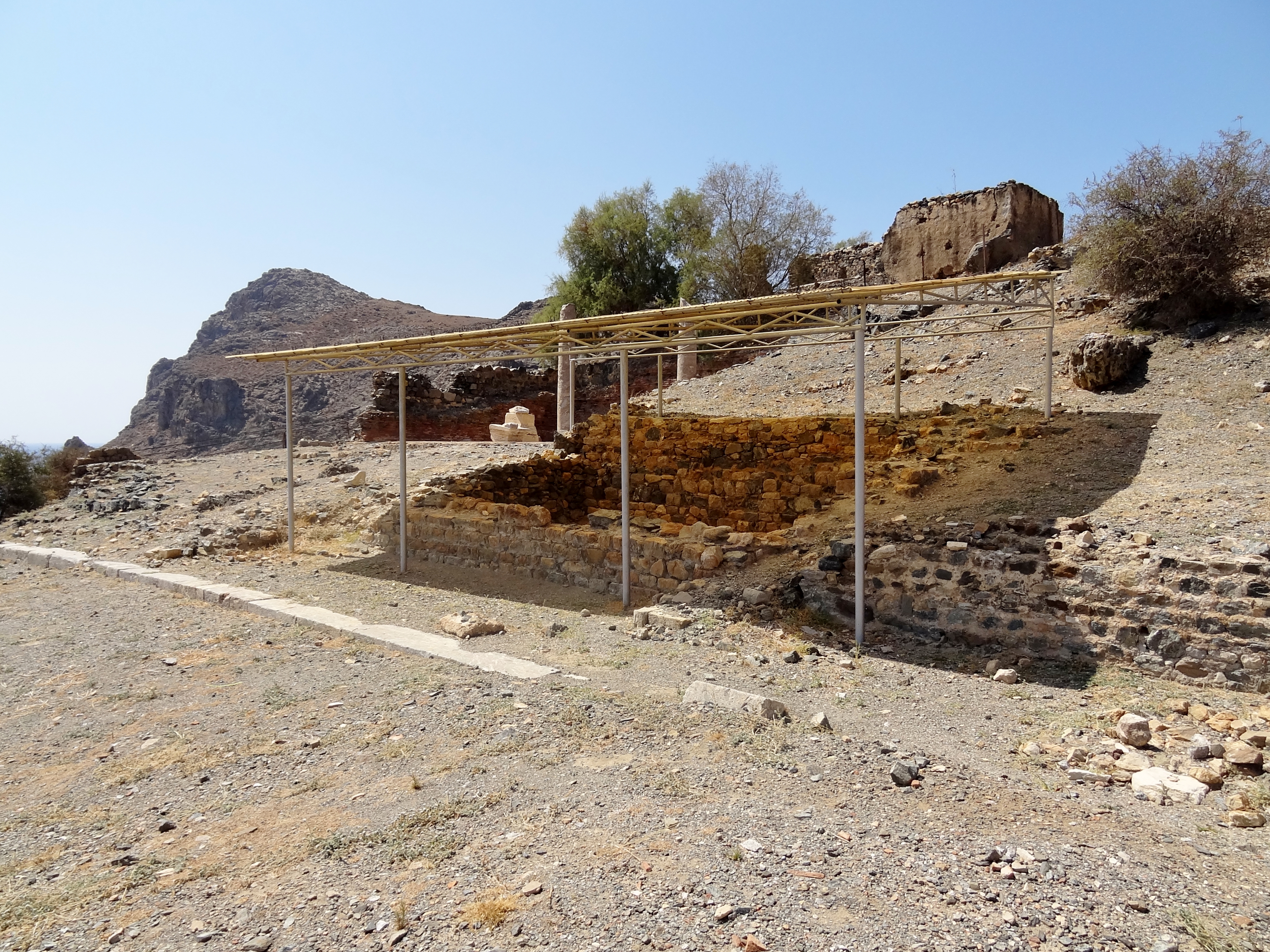 Blick auf das Asklepios-Heiligtum des antiken Leben (Λεβήν) in Lendas, Gemeinde Gortyna, Regionalbezirk Iraklio, Kreta, Griechenland